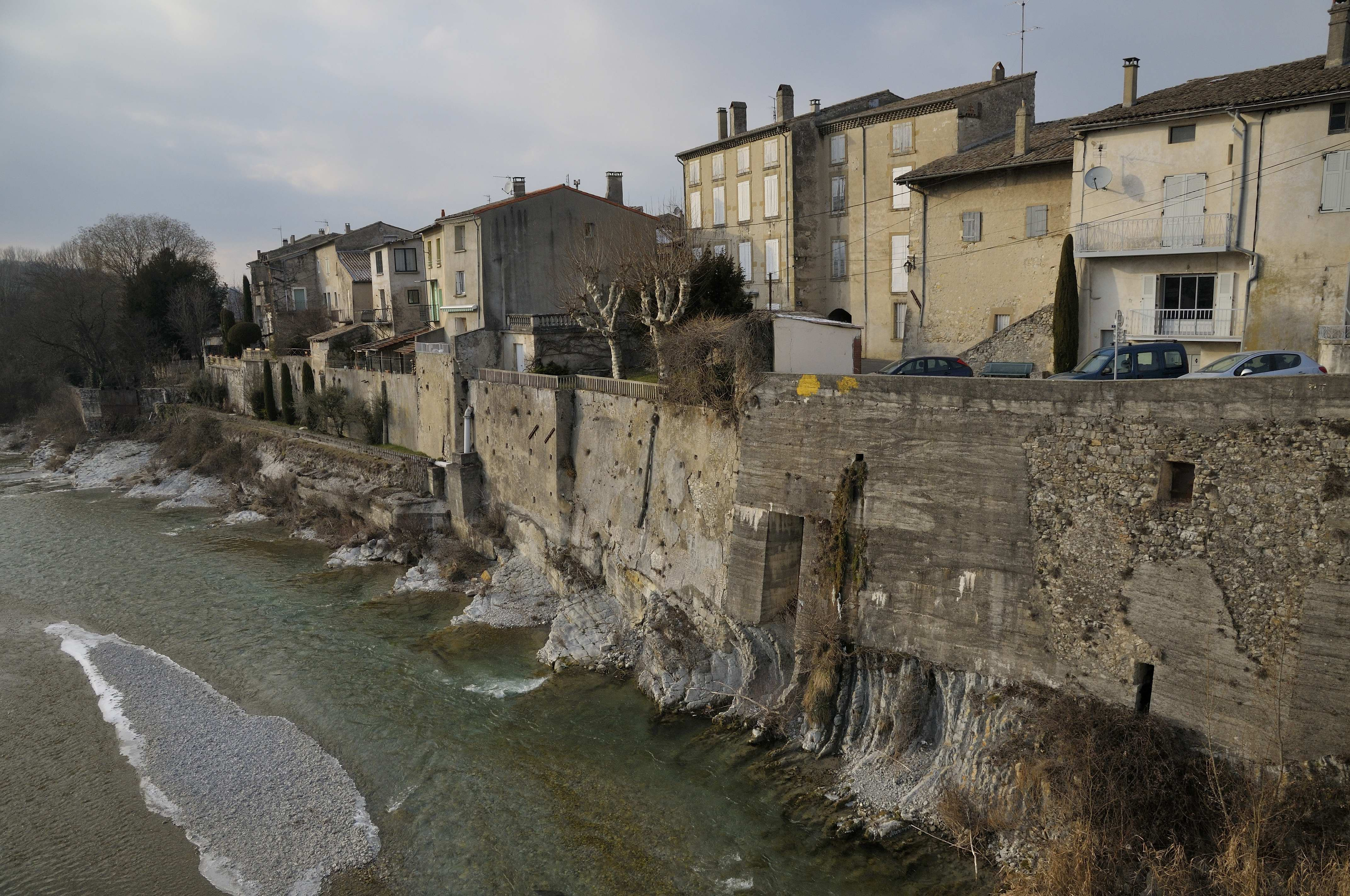 vue en aval du pont d'Aouste